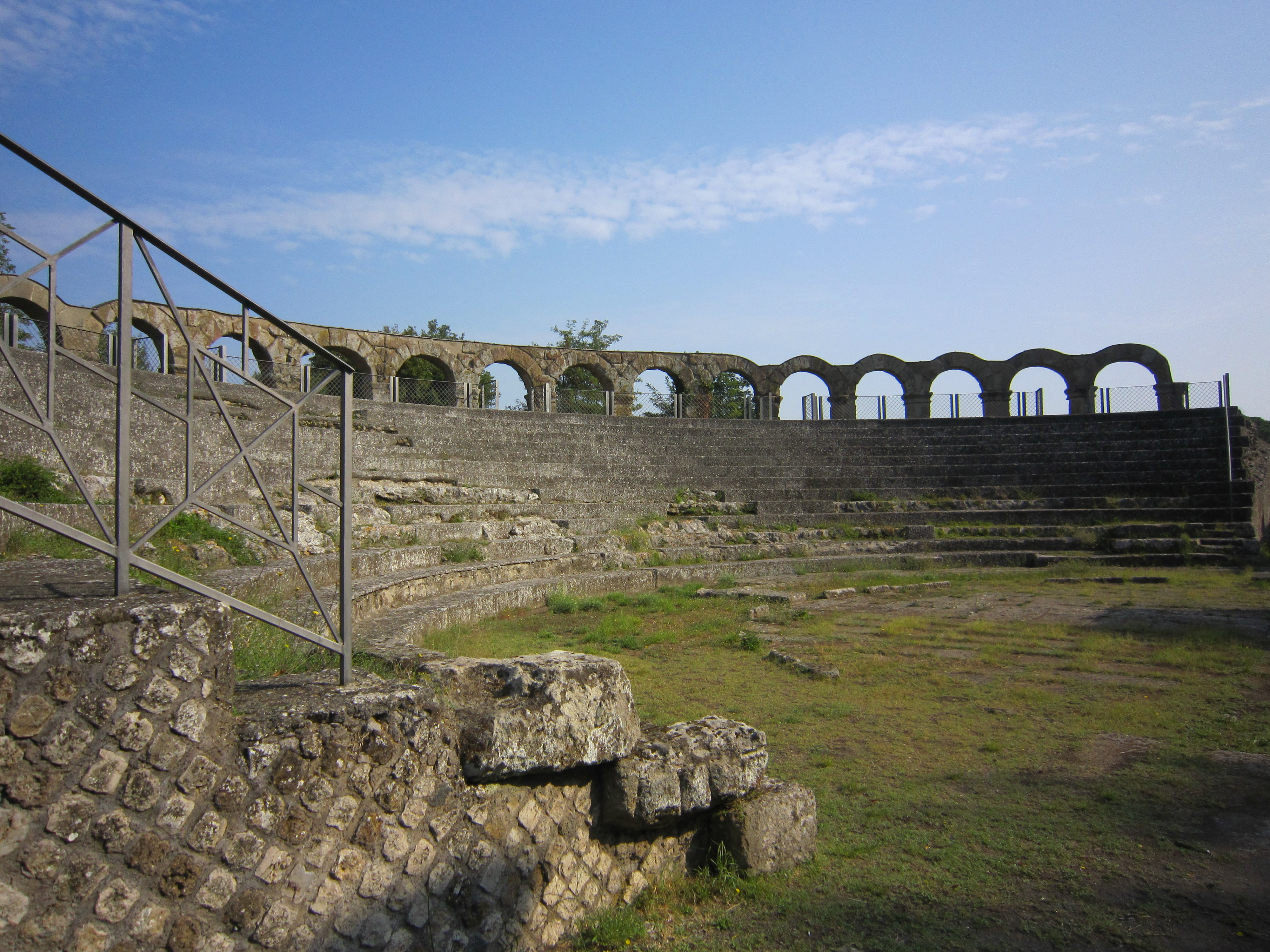 Ferentium, il teatro: cavea